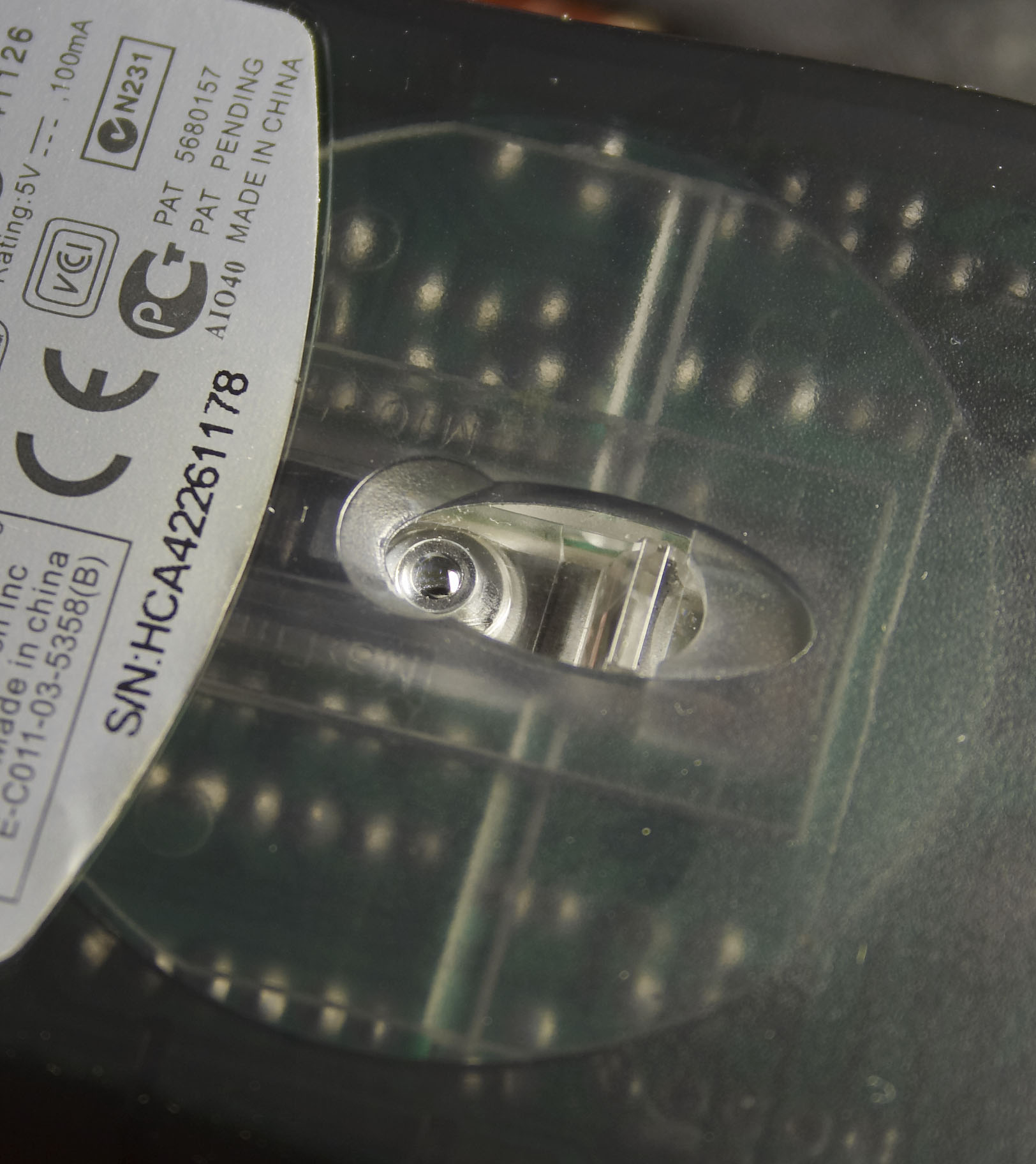 Eye mouse motion detector